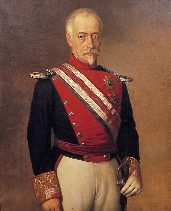 Francisco Javier Girón y Ezpeleta, duque de Ahumada (02-09-1844 a 18-07-1854).